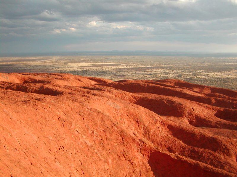 Vue depuis le sommet d'Uluru Auteur : Utilisateur:THA-Zp